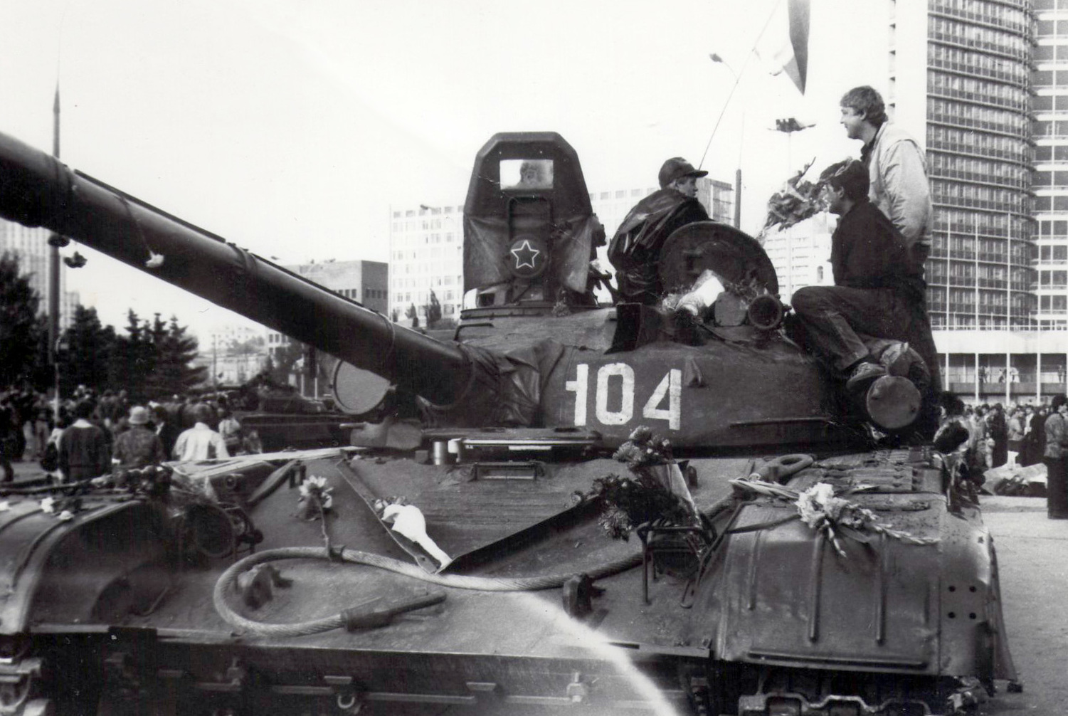 Танк T-72 в цветах. Москва, площадь у здания СЭВ, 19 августа 1991.